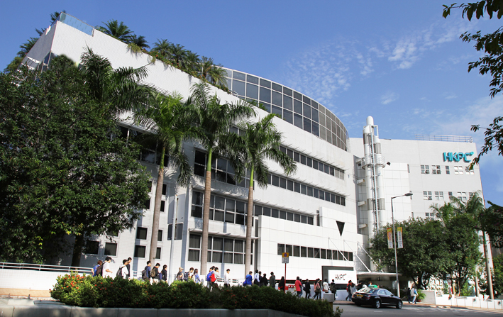 中文（香港）: 香港生產力促進局